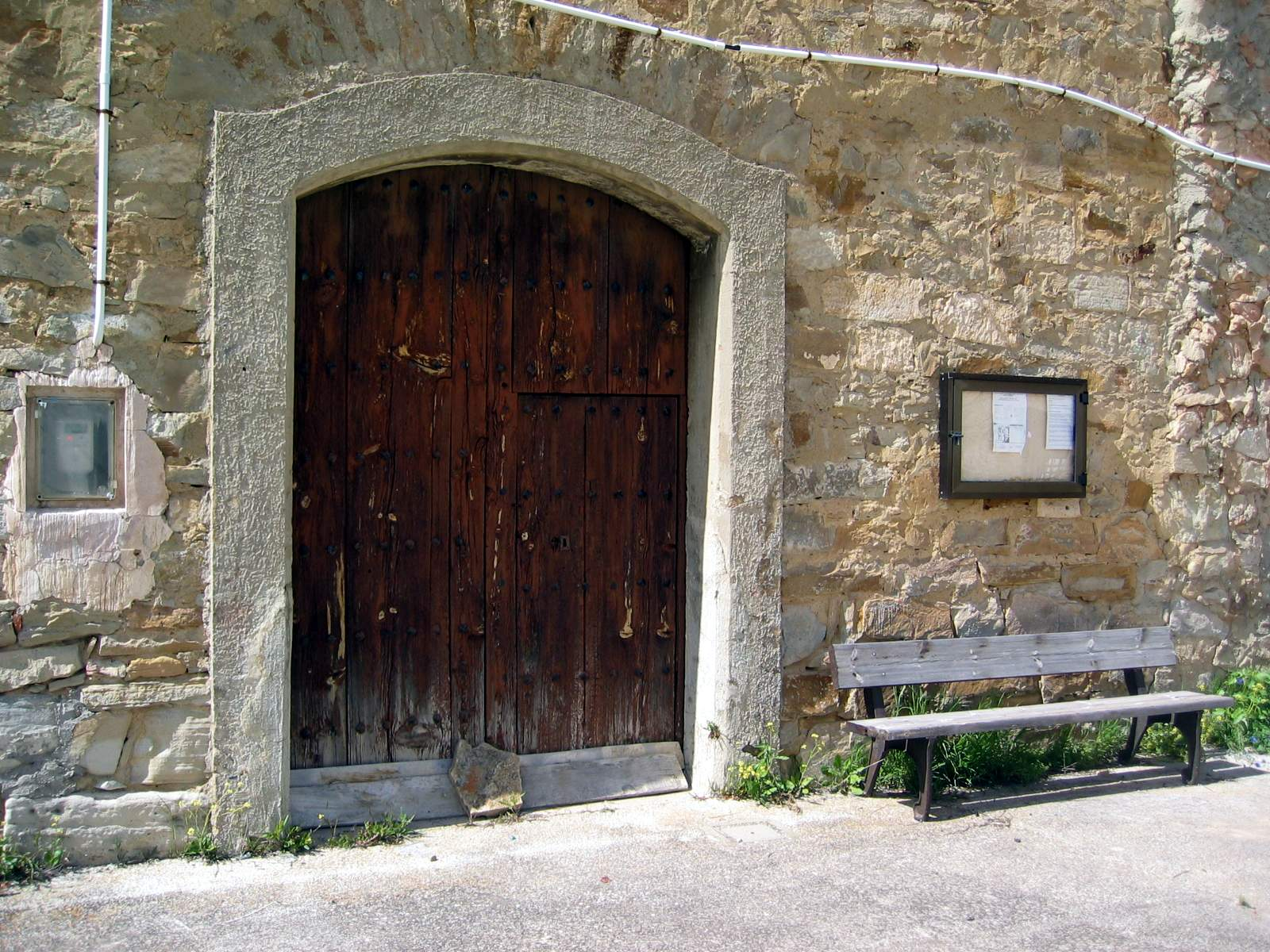 Vista parcial (meridional) de la iglesia parroquial de Arroyo Cerezo, Castielfabib (Valencia), año 2013.